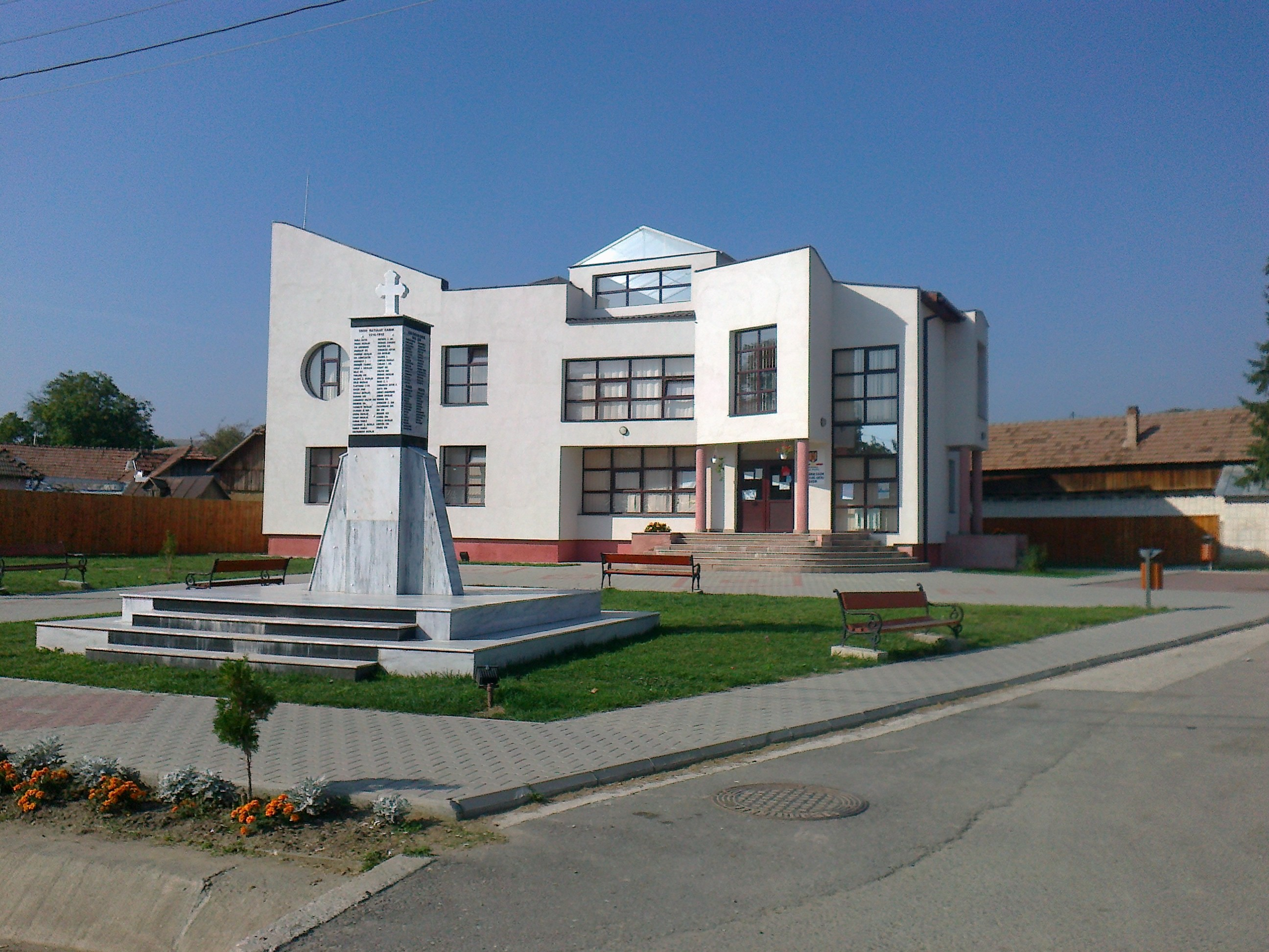 Primăria și Monumentul eroilor din Cașin